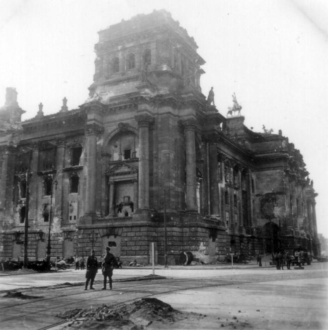 Berlin, Reichstag, sowjetische Soldaten Berlin.- Sowjetischer Offizier und Soldat vor Reichstag stehend; Anfang Mai 1945